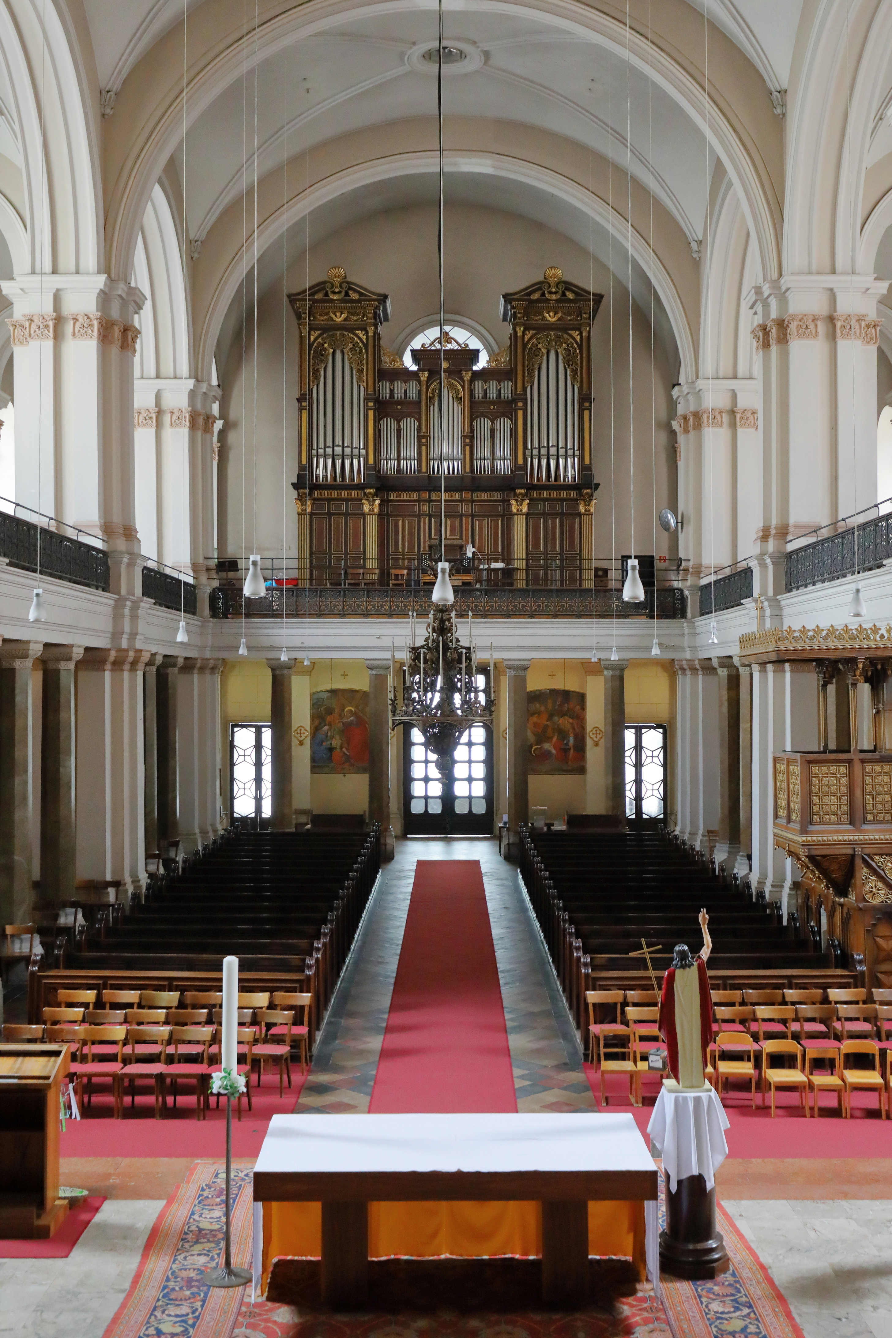 Innenansicht der Johannes-Nepomuk-Kirche in Richtung Orgelempore im 2. Wiener Gemeindebezirk Leopoldstadt.Die Kirche wurde ab 1841 nach Plänen von Karl Rösner in Formen des romantischen Historismus errichtet und am 18. Oktober 1846 geweiht. 1945 wurde die Kirche durch Bombentreffer schwer beschädigt. Die Orgel ist ein Werk von der Oberösterreichischen Orgelbauanstalt St. Florian und wurde am 16. Mai 1990 geweiht. Dabei wurde das Gehäuses der ehemaligen Orgel der Kremser Stadtpfarrkirche verwendet, die Franz Capek 1896 fertigte.